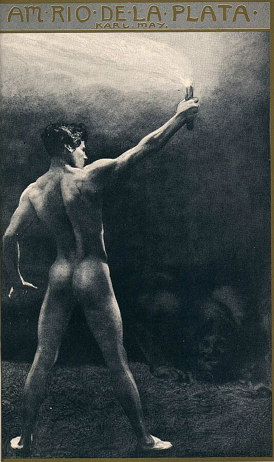 Karl May: Am Rio de la Plata. Einbandillustration von Sascha Schneider